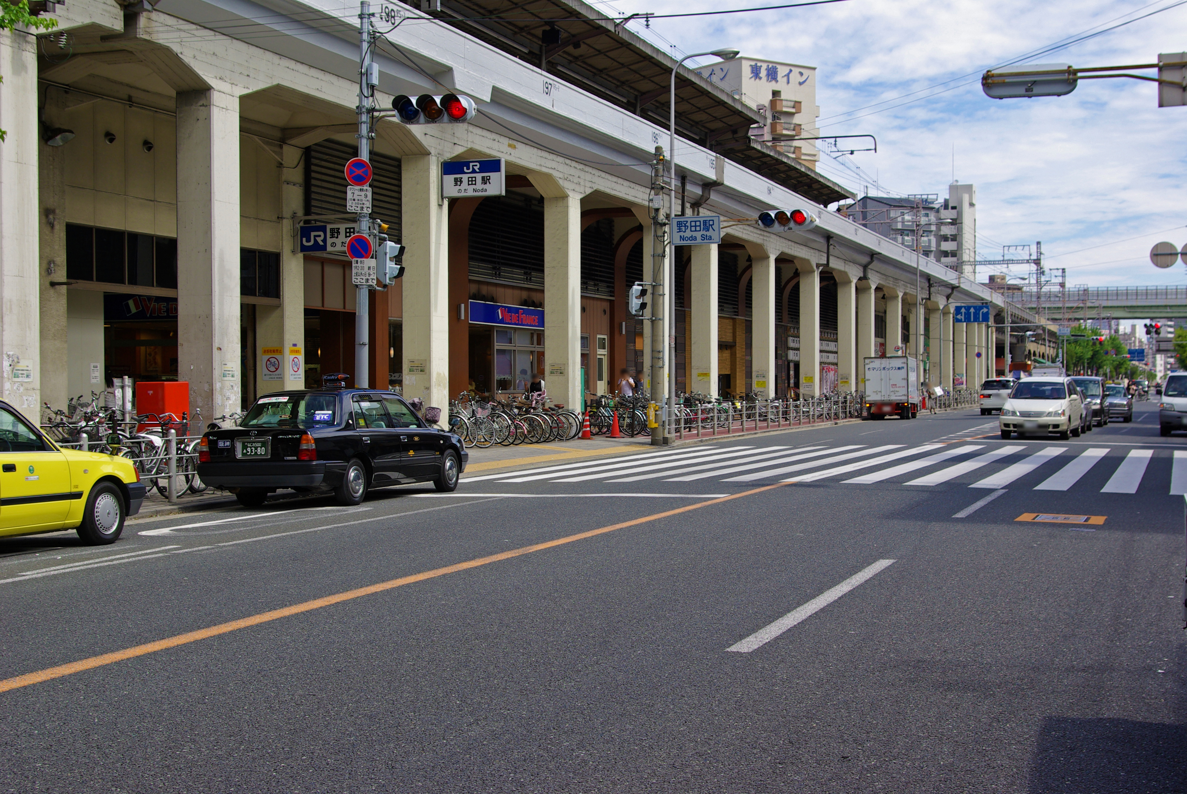 西日本旅客鉄道大阪環状線野田駅